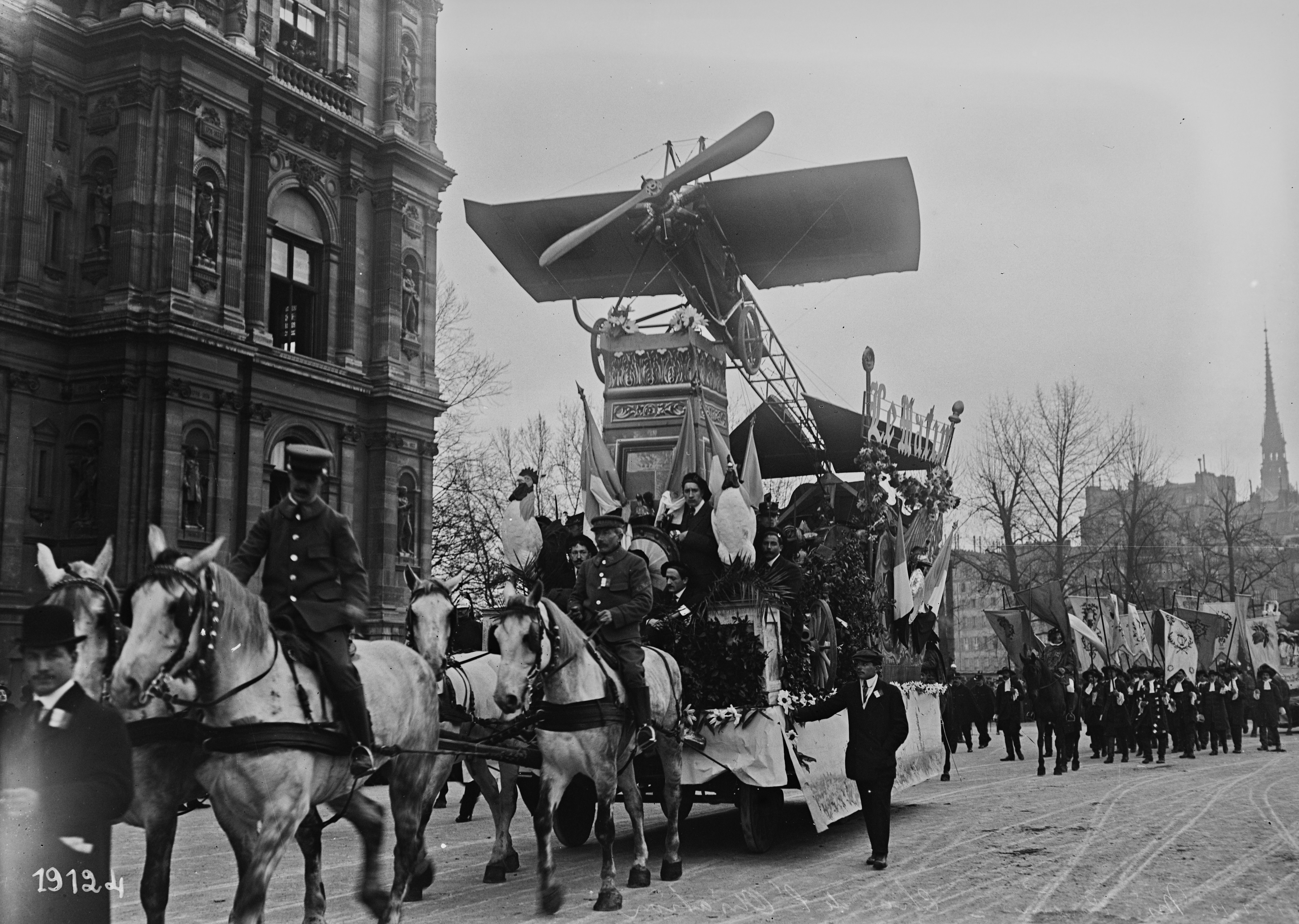 Le char de l'aviation passe devant l’Hôtel de Ville de Paris le jeudi de la Mi-Carême 14 mars 1912.